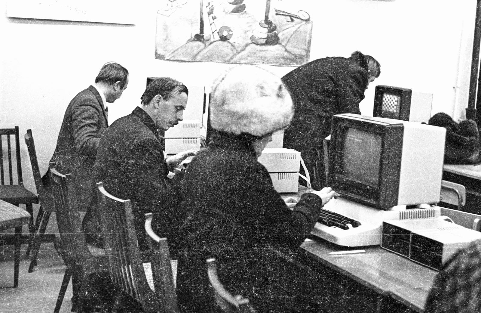 Компьютерный класс школы № 2 на Чкаловском посёлке, первая зимняя детская компьютерная школа (1985—86), компьютеры «Правец 82». С компьютерами знакомятся неизвестные школьные работники. Зимой в этом классе велись занятия для детей и для взрослых. Экзаменов не было: дети отчитывались творческими работами, а взрослые никак не отчитывались. Занятия вели молодые сотрудники Института программных систем: Пинчуки, Hестеровы, Грязновы, Вячеслав Крюков, Леонас, Люся Гайдар, Чернышенко.